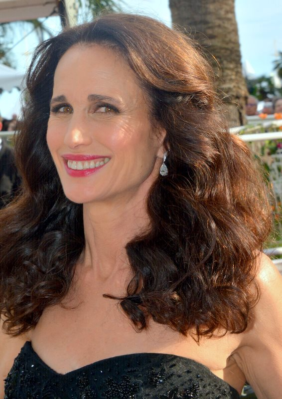 Andie MacDowell au festival de Cannes